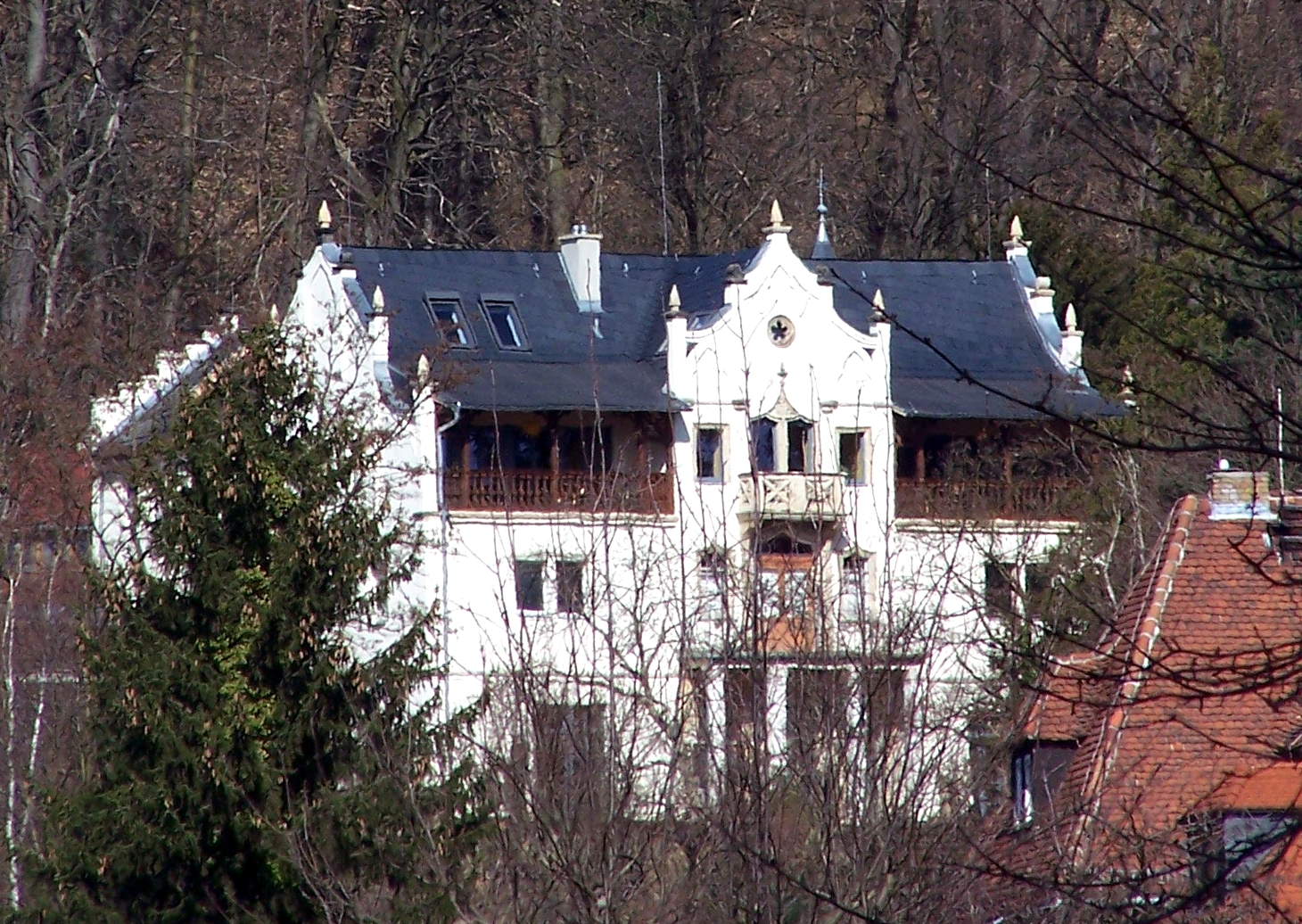 Villa Jägerberg (Augustusweg 110) in Radebeul